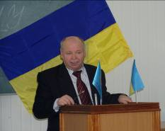 Шишка Роман Богданович — академік АН вищої школи України